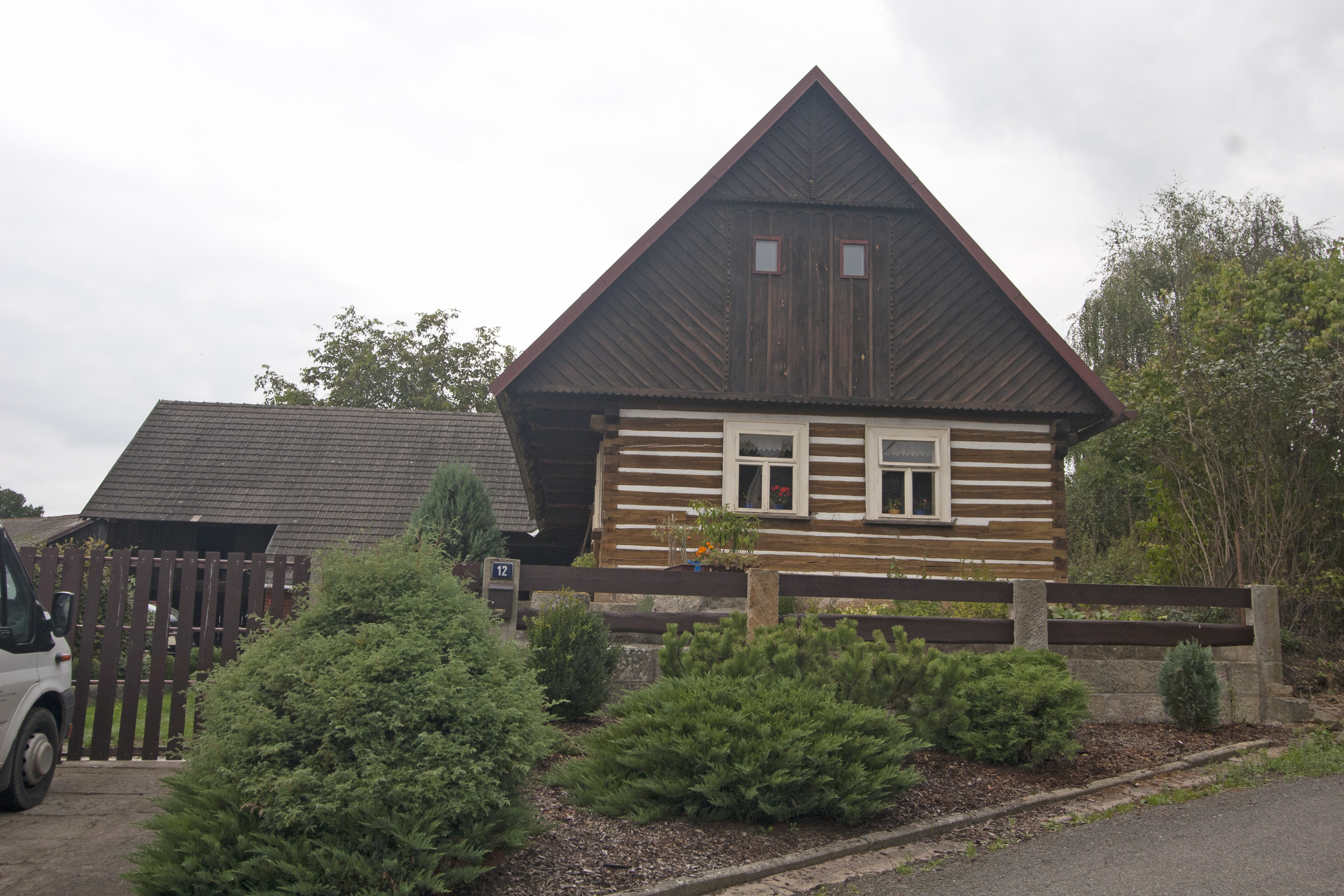 Březovice čp. 12